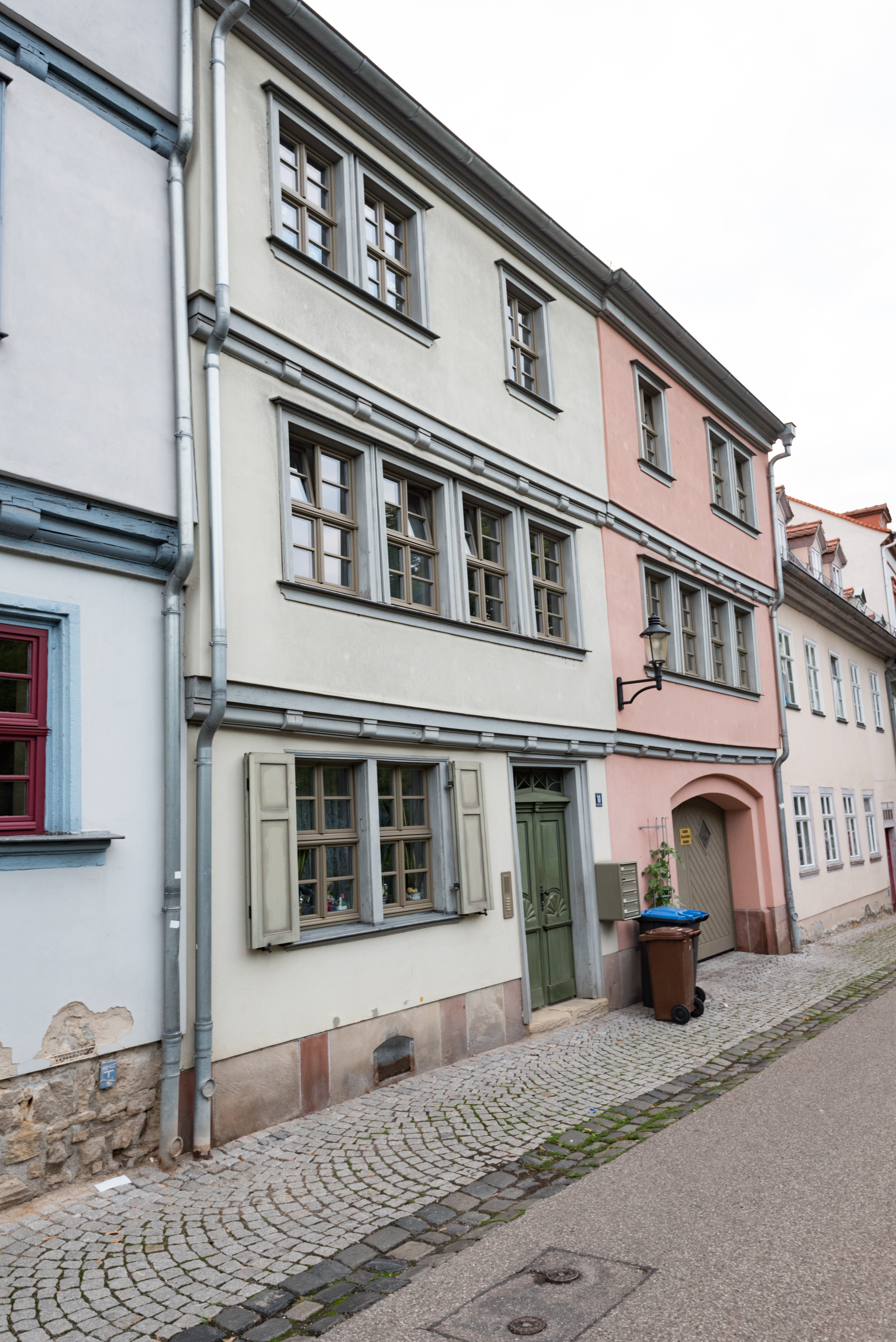 Naumburg (Saale), Kramerplatz 10